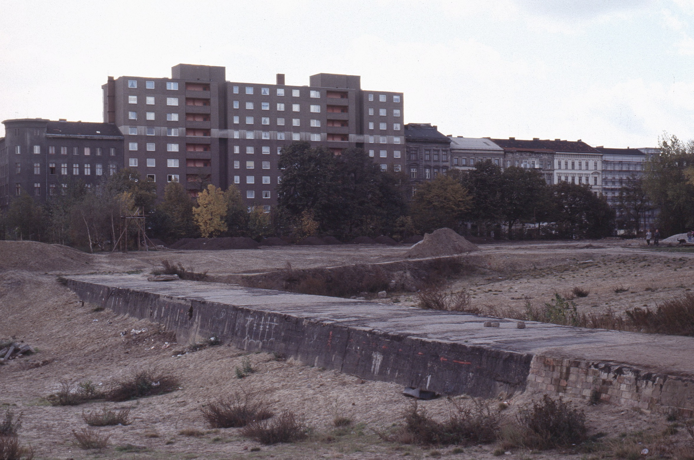 Berlin Görlitzer Bahnhof Fußgängertunnel, Scan von Dia